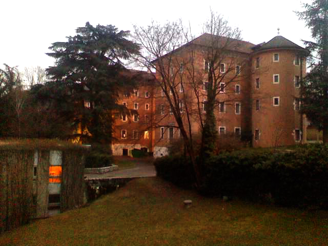 Le Conservatoire d'Art et d'Histoire d'Annecy. L'école des Gobelins sur la gauche et le conservatoire et sa tour ronde au centre